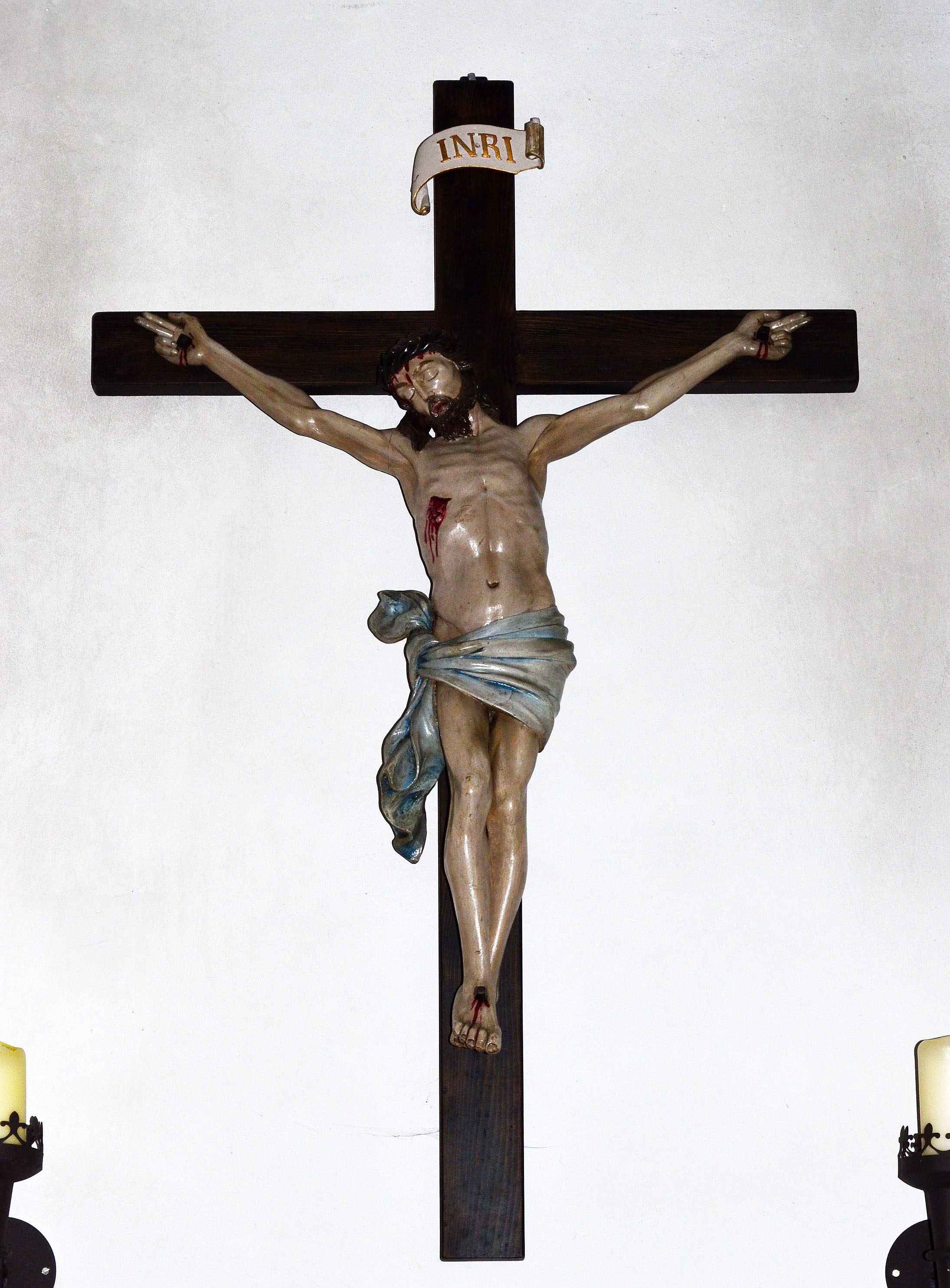 Brilon, Keffelker Kapelle, Kreuz. 2JPG